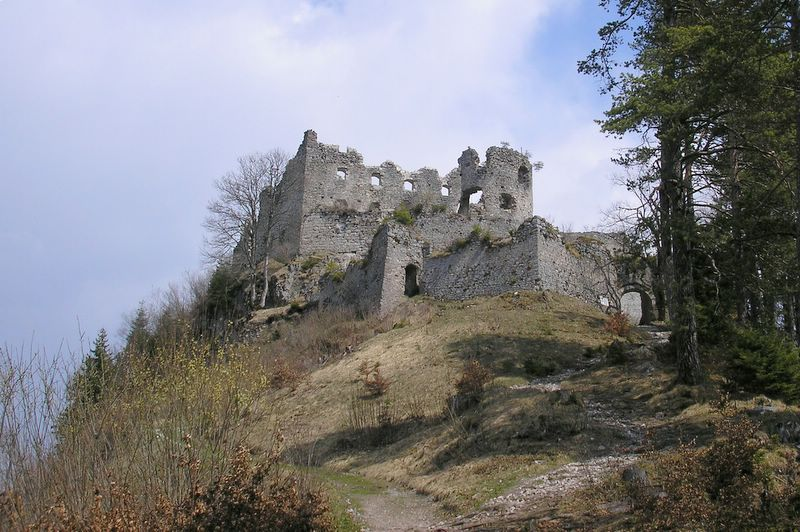 Burg Ehrenberg bei Reutte (Tirol). Ansicht von Süden.